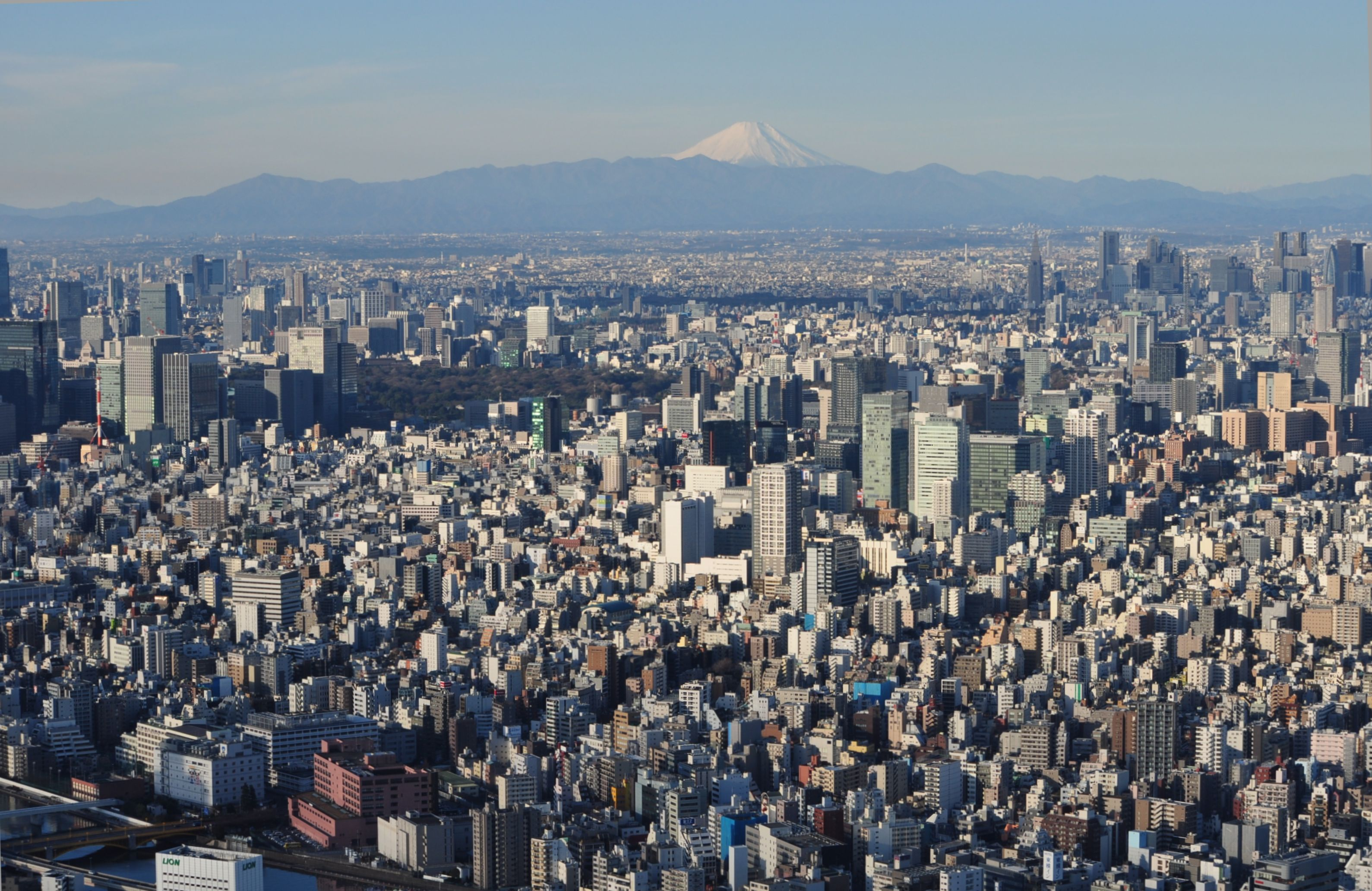 元旦に訪れ、展望デッキから富士山を拝みました。